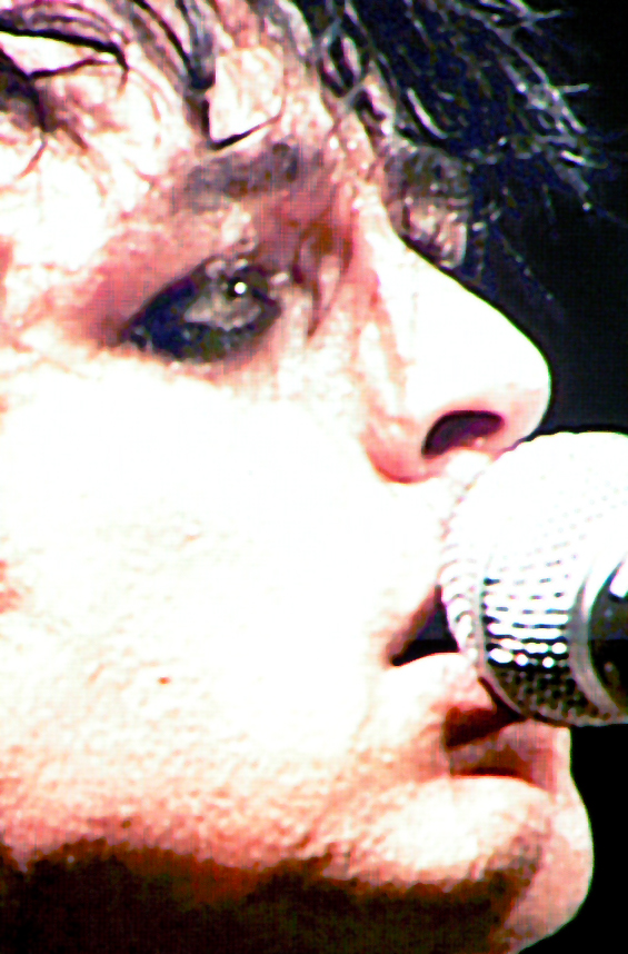 Billie Joe Armstrong of Green Day